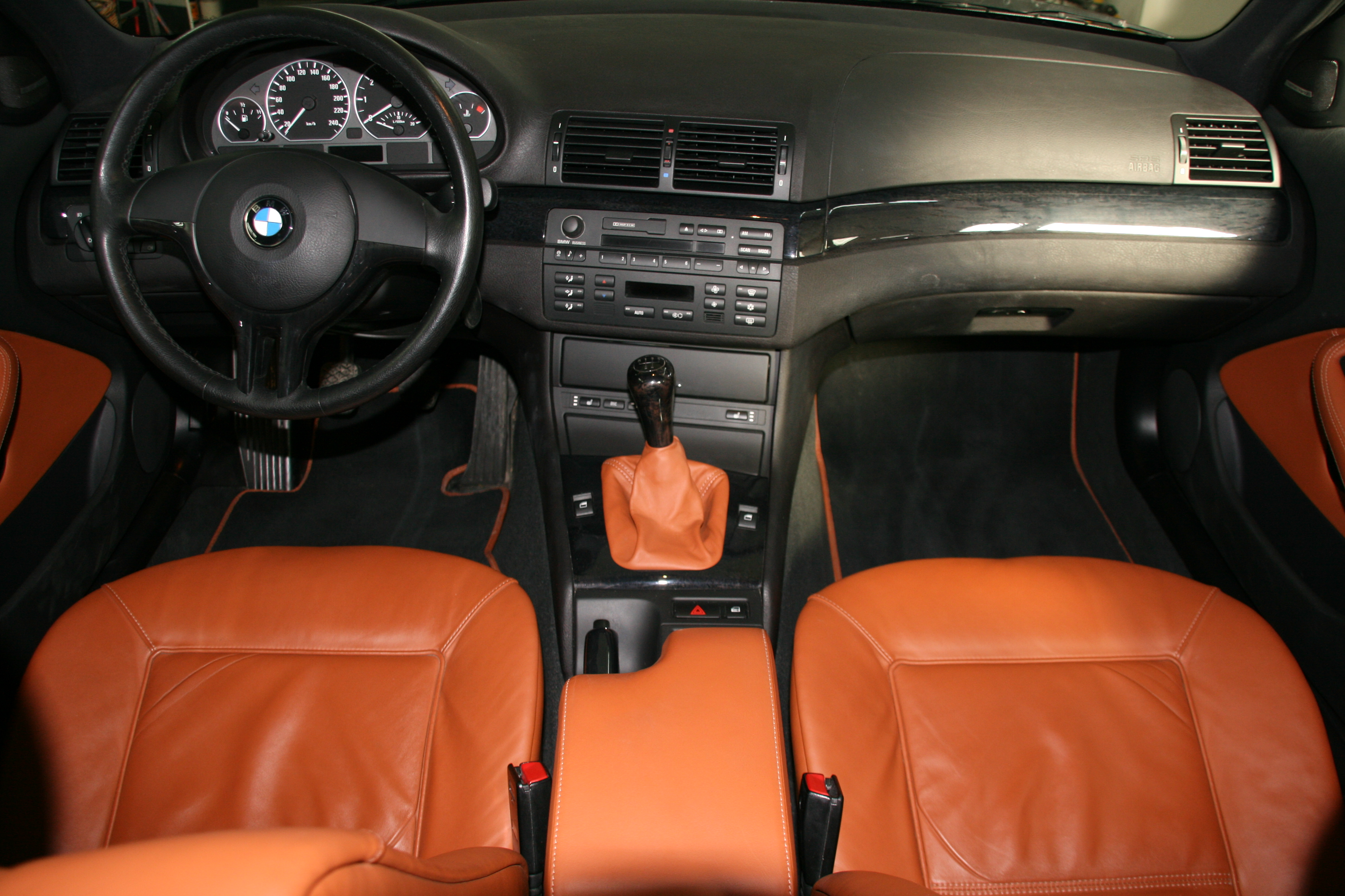 BMW 325xi touring "BMW Special Edition" in Carbonschwarz metallic und Leder Zimt